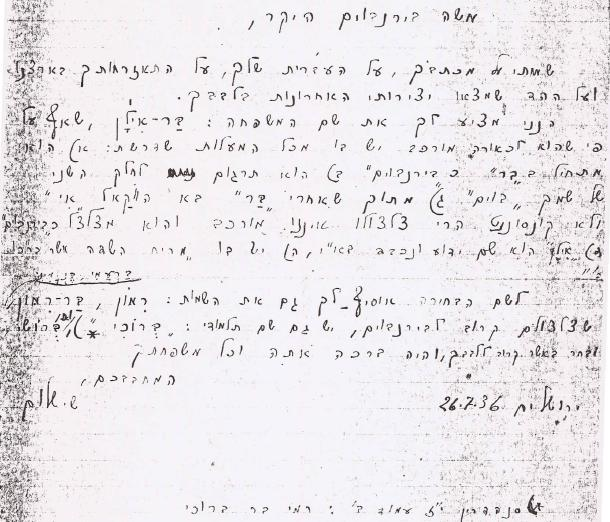 מכתב מש. שלום למשה בירנבאום המציע מגוון שמות משפחה לעברות, ובראשם השם "בר-אילן" רישיון נוצר על ידי משתמש:Danga